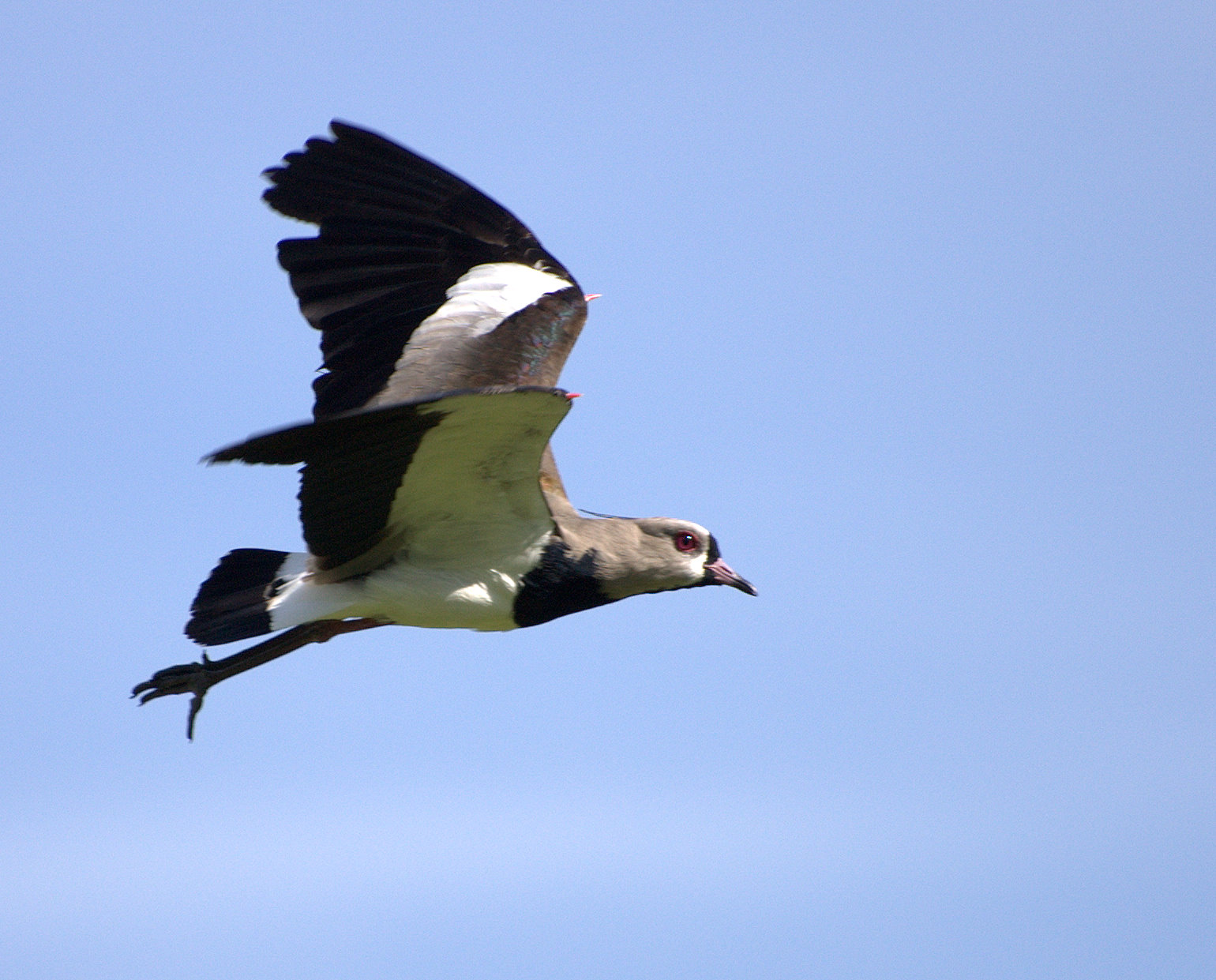 Jardim Botânico de São Paulo